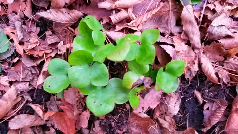 Hepatica nobilis - Jaterník podléška v lokalitě Radotínského údolí